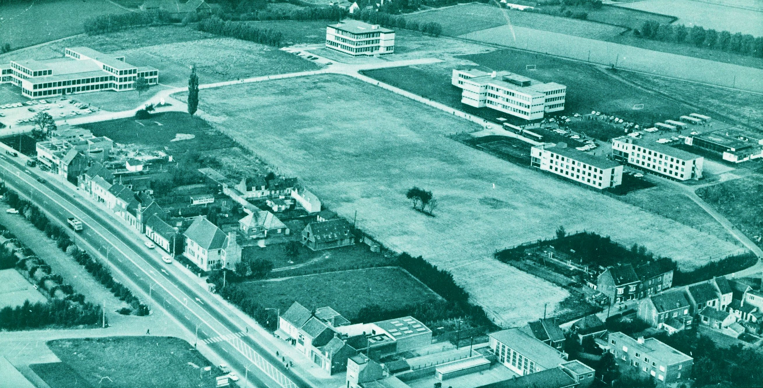 De Kathocampus is gelegen tussen de Doorniksesteenweg en de Steenbakkersstraat in Kortrijk.